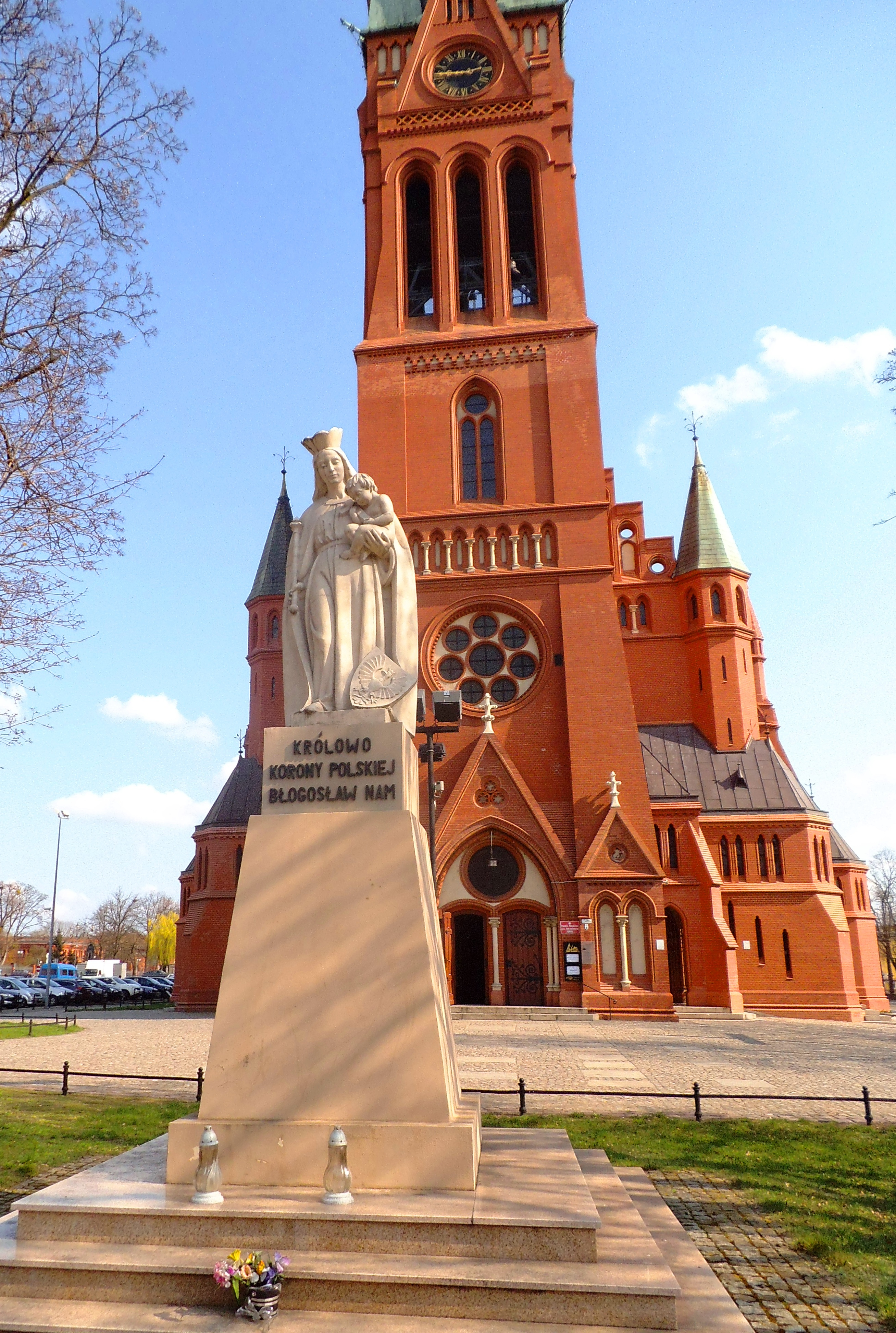 Figura Matki Boskiej Królowej Korony Polskiej w Toruniu3